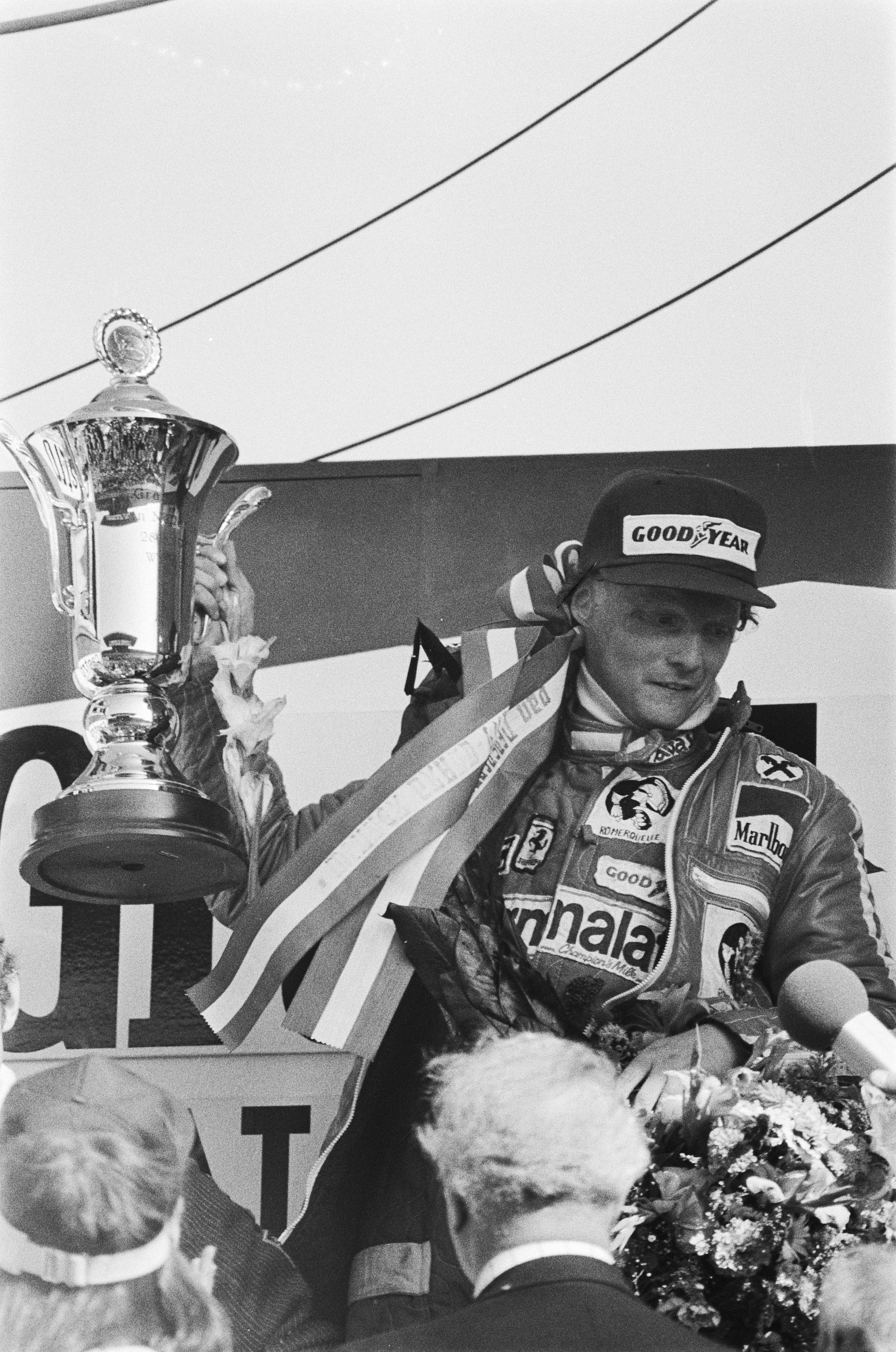 Collectie / Archief : Fotocollectie Anefo Reportage / Serie : [ onbekend ] Beschrijving : Grand Prix Zandvoort; Niki Lauda tijdens huldiging Datum : 28 augustus 1977 Locatie : Noord-Holland, Zandvoort Trefwoorden : autoraces Persoonsnaam : Lauda, Niki Fotograaf : Suyk, Koen / Anefo Auteursrechthebbende : Nationaal Archief Materiaalsoort : Negatief (zwart/wit) Nummer archiefinventaris : bekijk toegang 2.24.01.05 Bestanddeelnummer : 929-3238